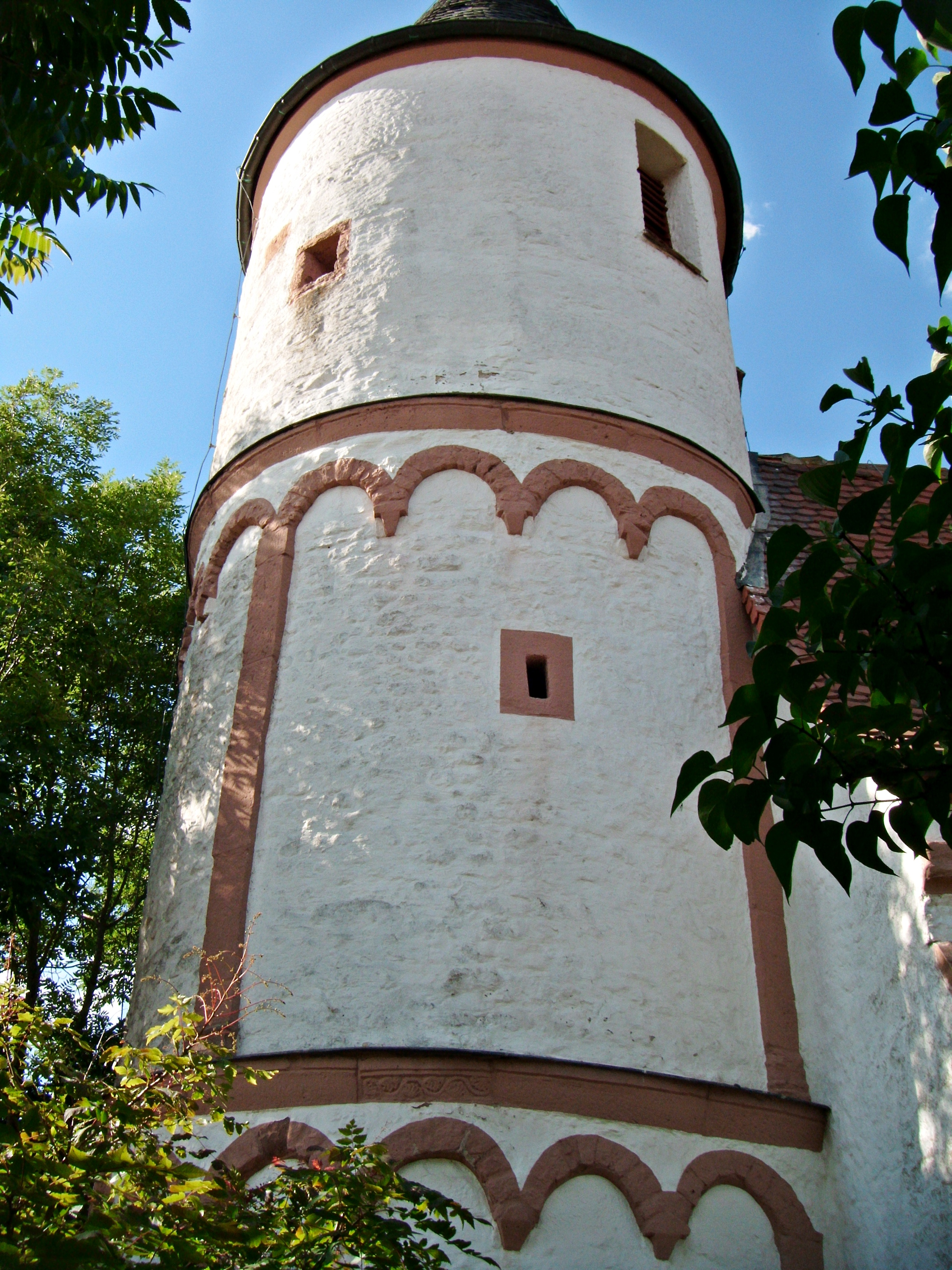 Quirnheim, Prot. Kirche, romanischer Turm von Osten